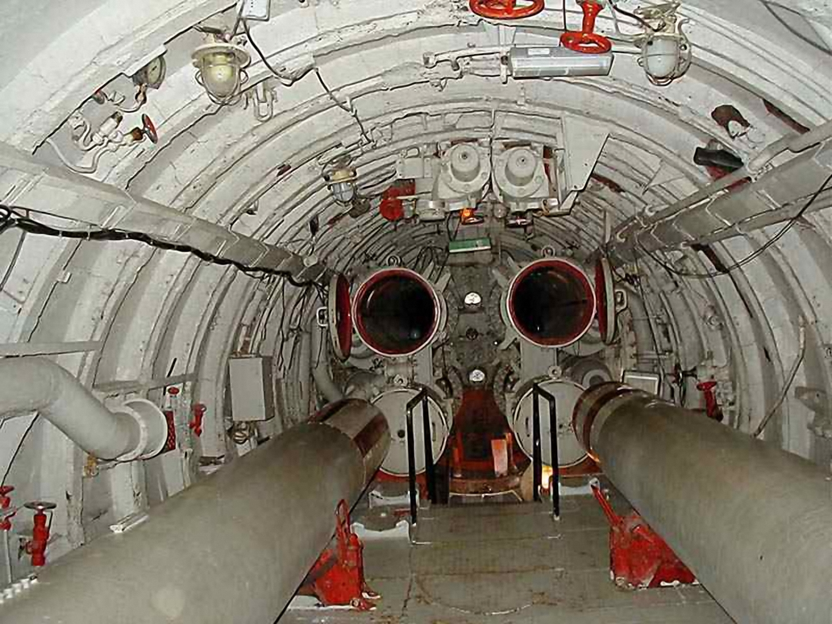 Подводные лодки проекта 613 - Модель 359 в Naksov, Дании, как корабль музей